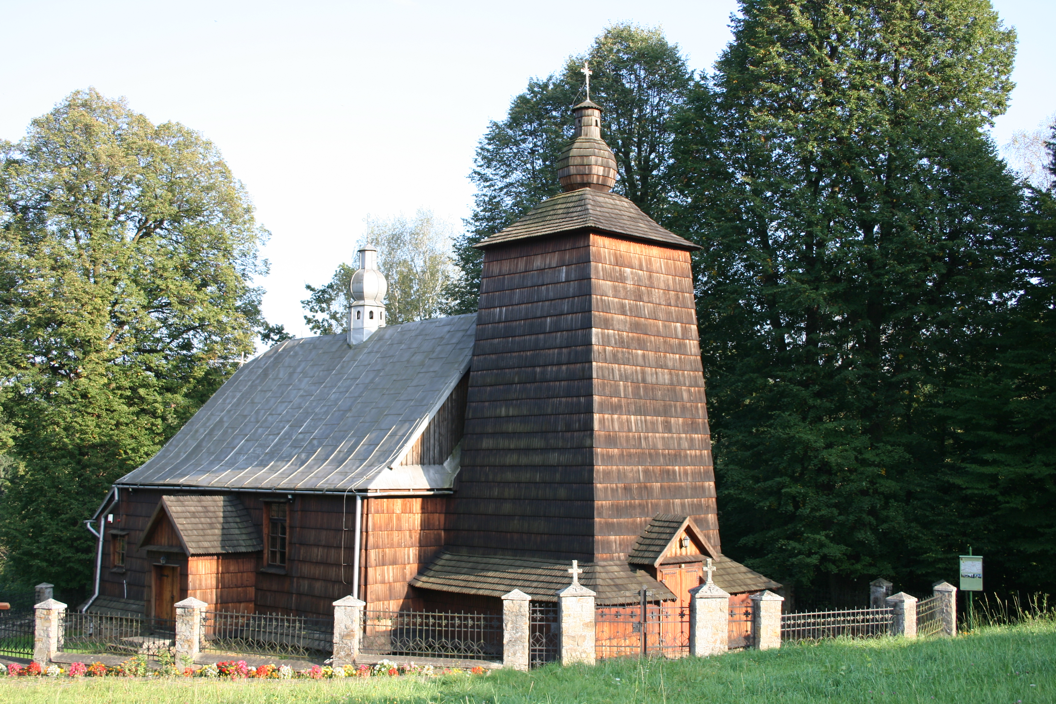 Bonarówka, cerkiew gr.-kat. p.w. Opieki Matki Boskiej, ob. kościół rzym.-kat., 1841, 1870